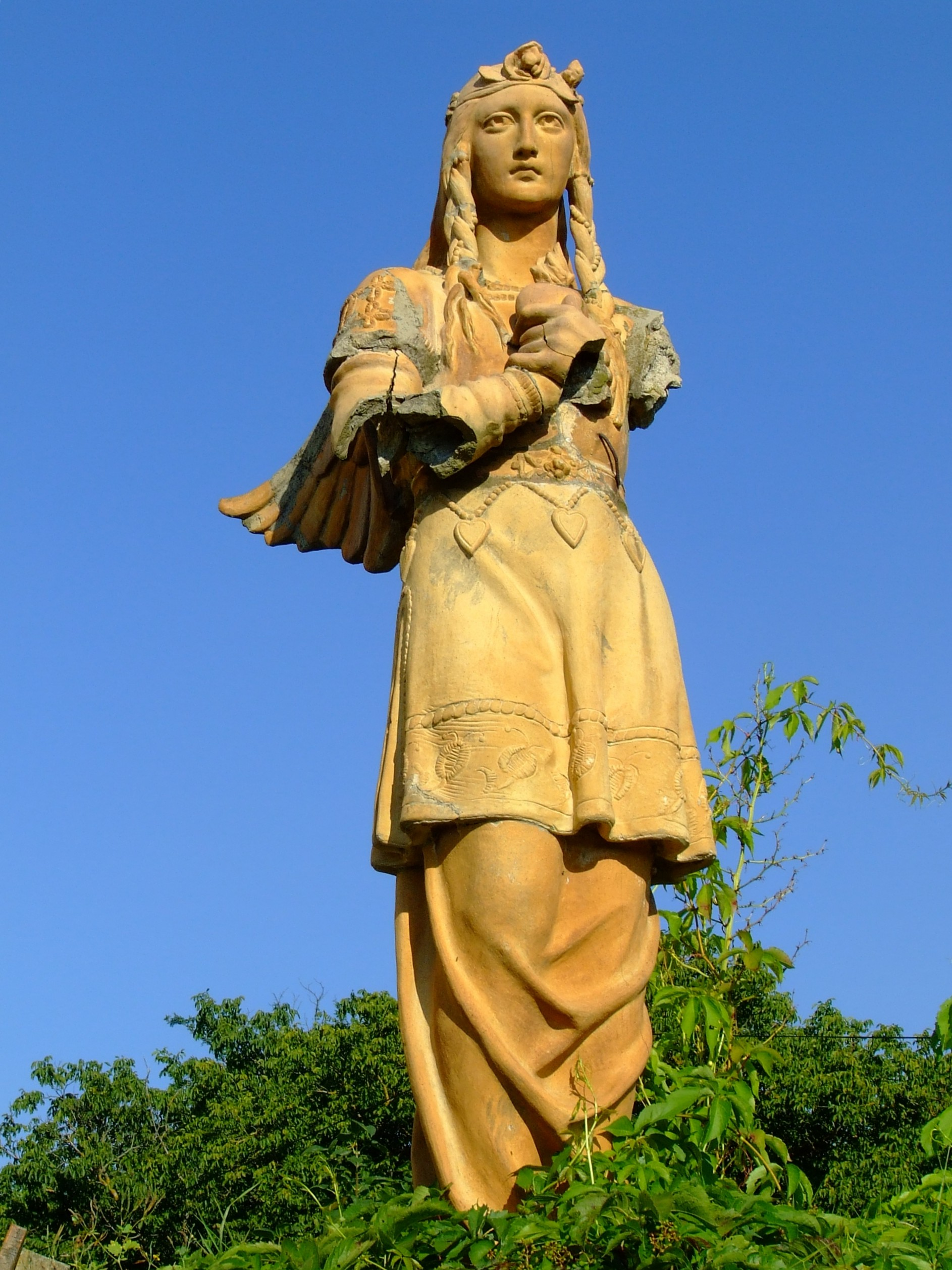 Szobor a máriakéméndi Nagyboldogasszony-templom előtt (Kiss György, 1912) a 2,5m-es nagyméretű, magyaros varkocsos, középkori öltözetű, domborműves mintájú tunikás angyalszobrokat Lechner Ödön tervezte, Hit és a Szeretet allegóriák szobrai, z eredeti angyalszobrok a Kőbányai Szent László templomhoz foorás: kozterkep.hu